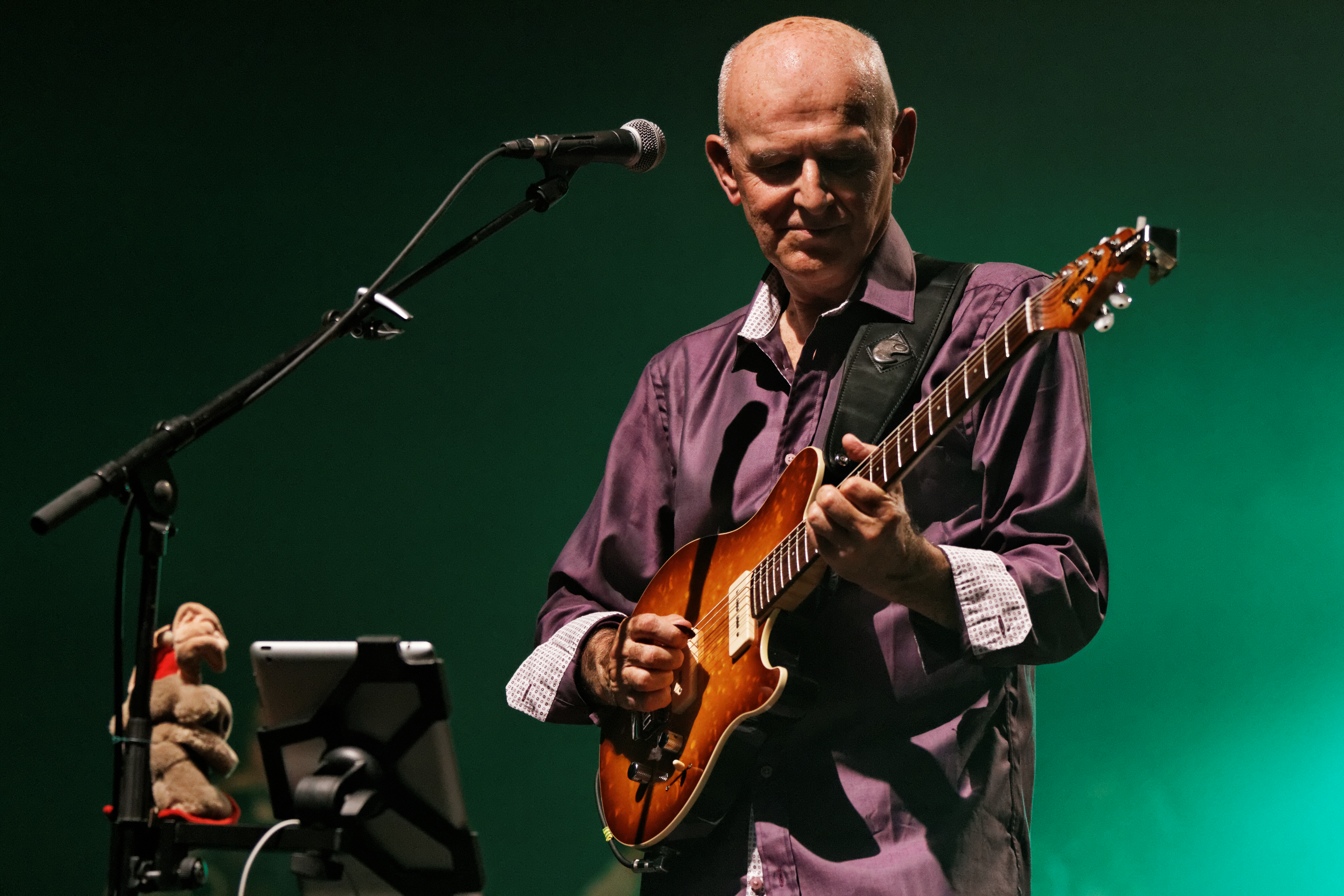 Dan ar Braz en concert sur la scène Gradlon lors du festival de Cornouaille 2013.